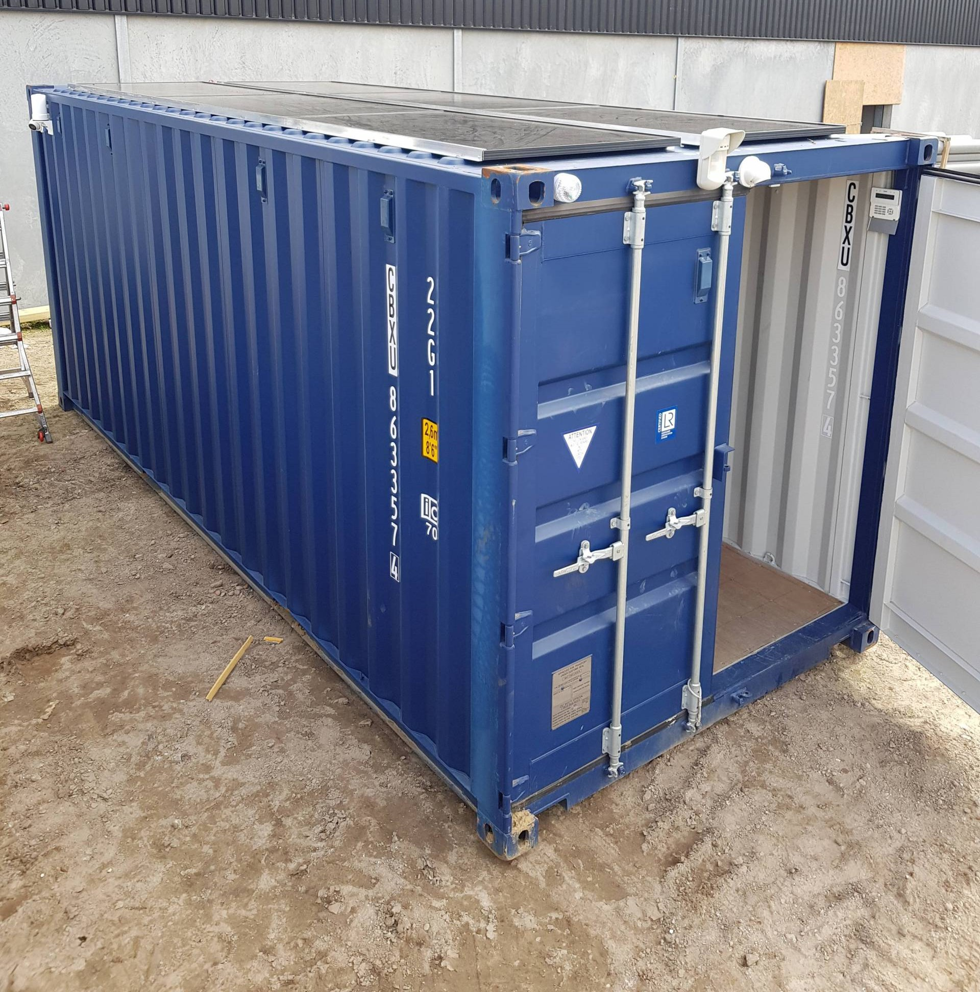 Containerbeveiliging voorzien van zonnepanelen, camera, bewegingssensor en alarm.